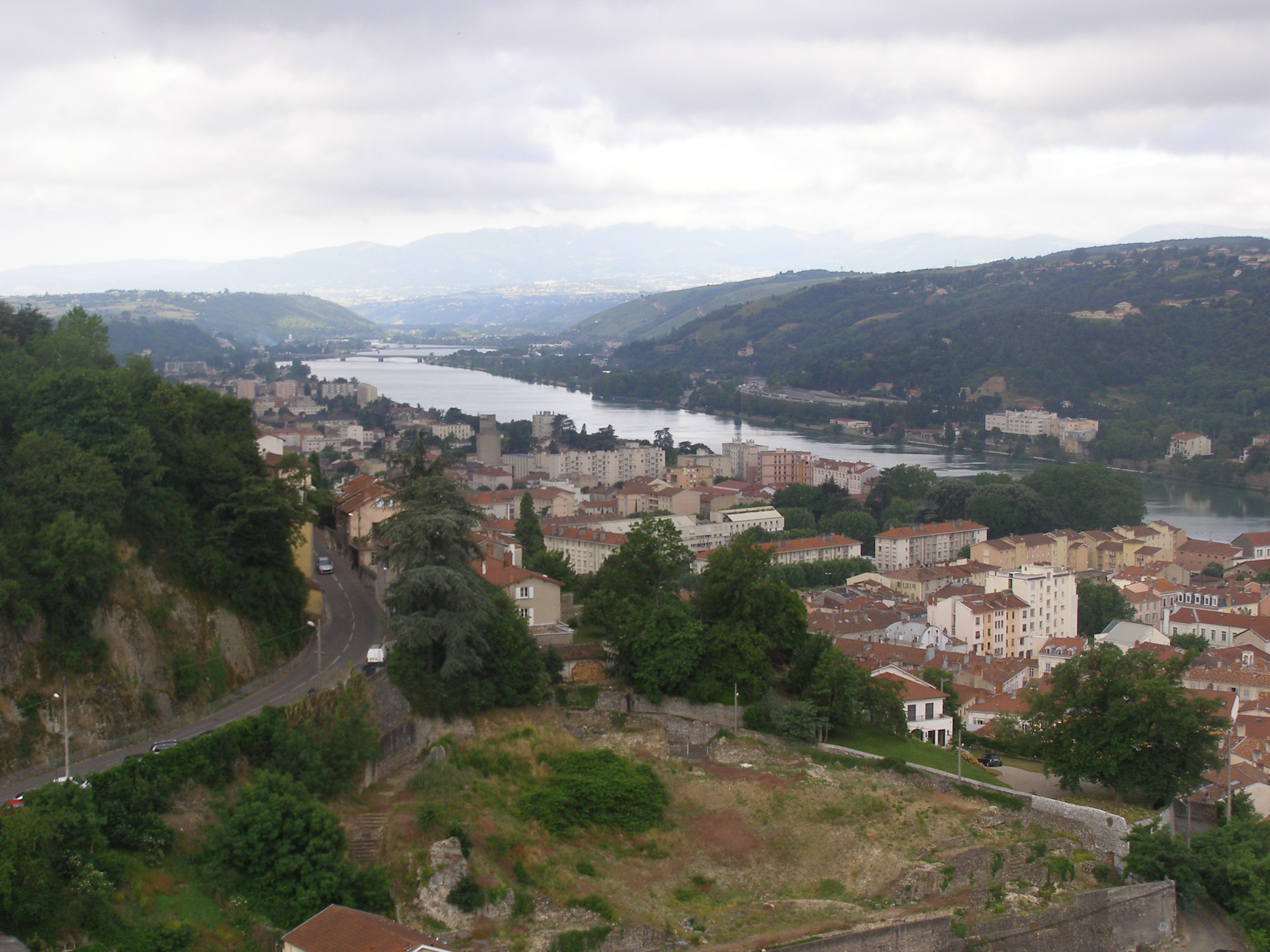 Vue sur la ville dans sa partie sud,avec à l'arrière plan le massif du Pilat .